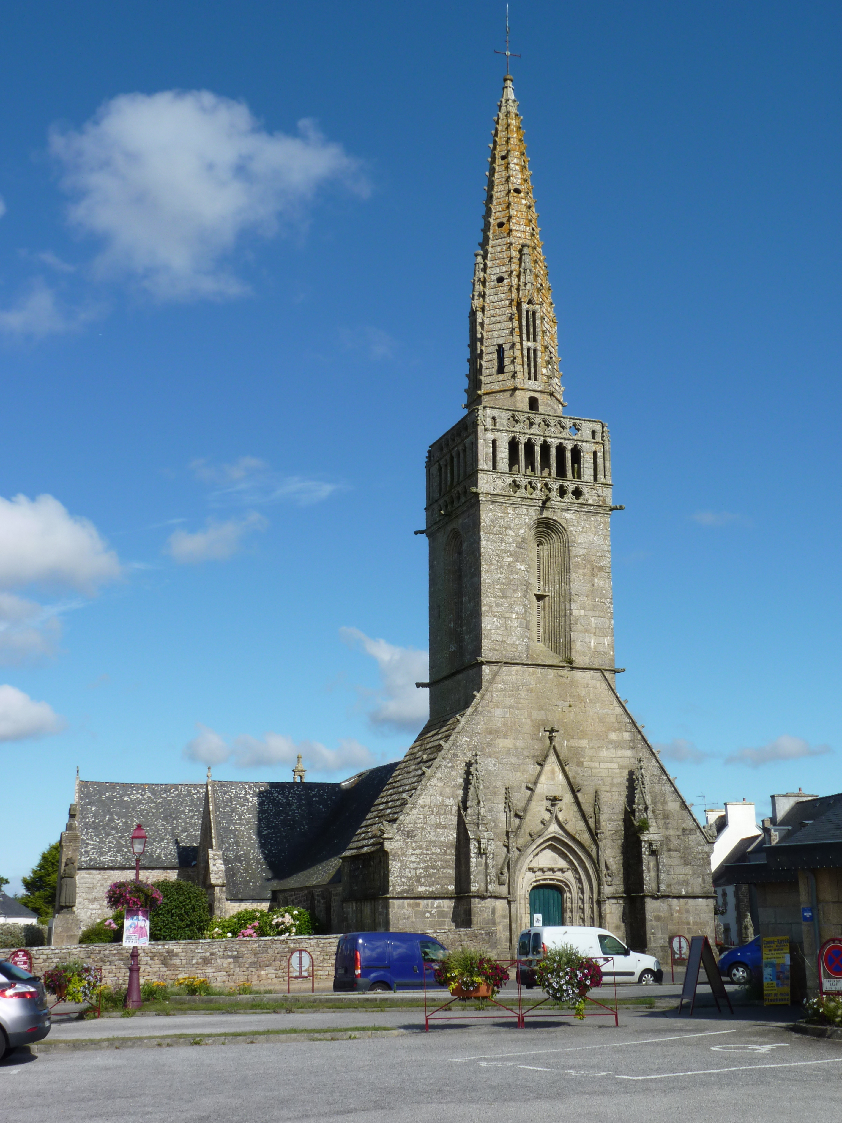 Église de Plouhinec (29)